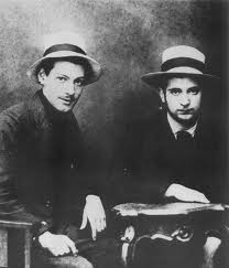 Stanislav Vinaver i Milutin Bojic